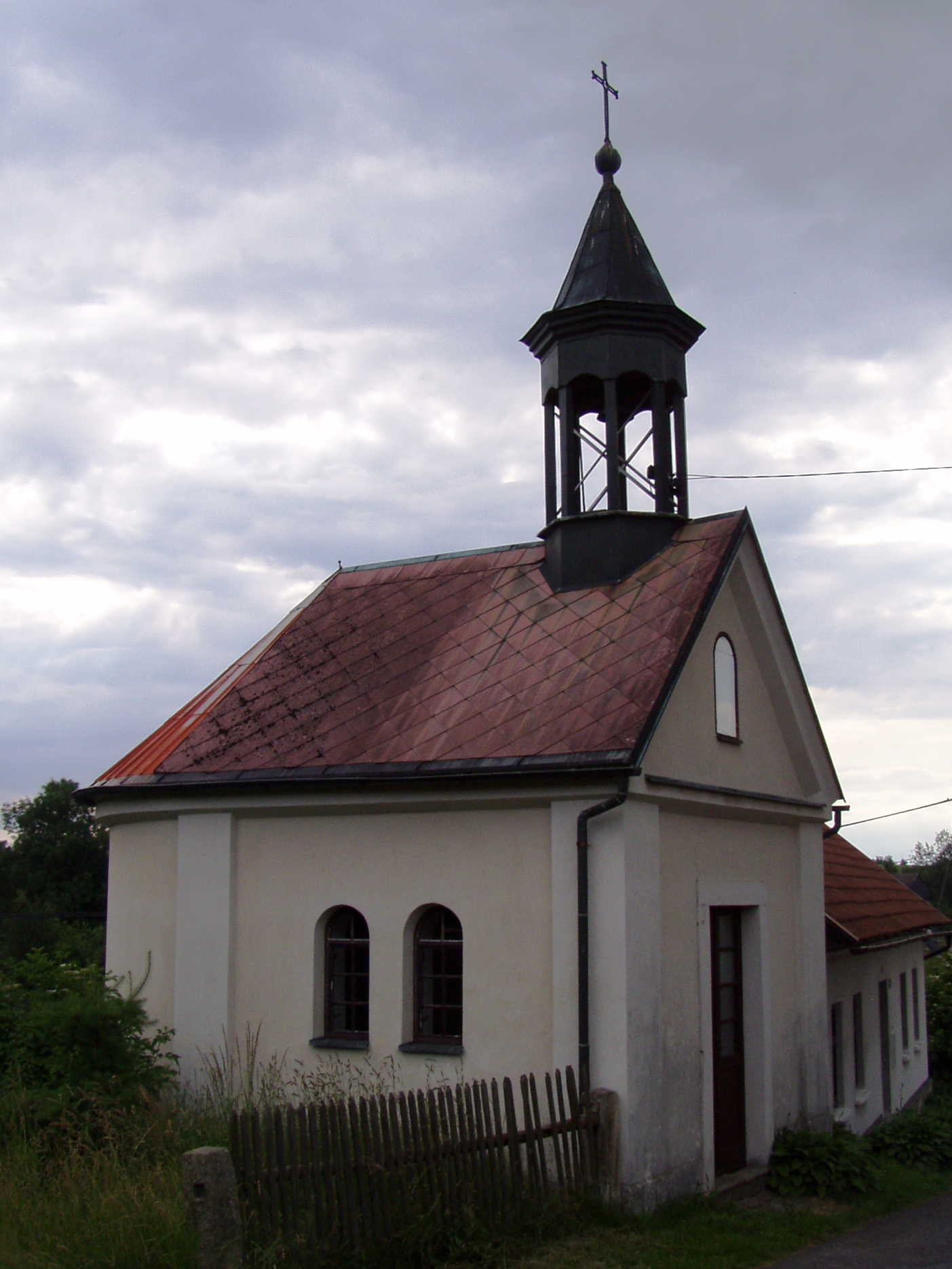 Kaple Nejsvětější Trojice (Stolín)